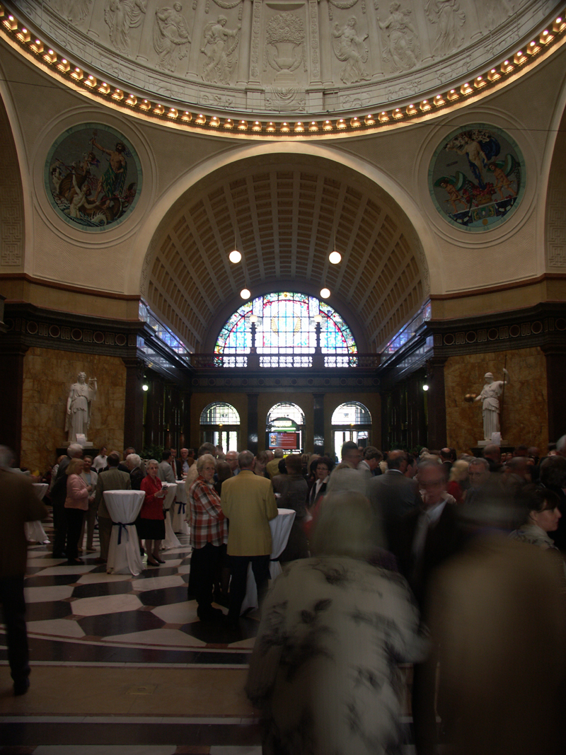 Kaszinó Wiesbaden belülről